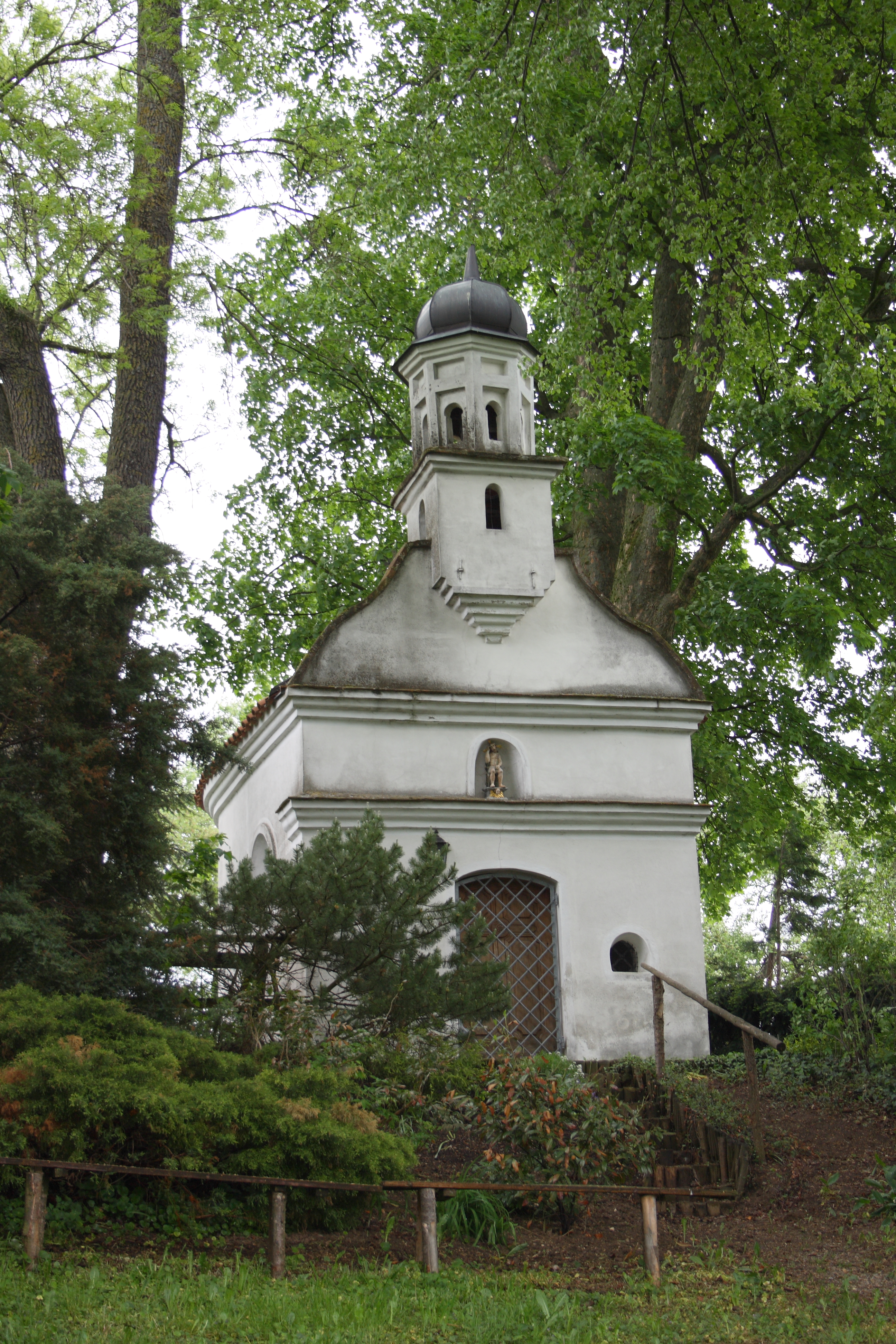 katholische Kapelle St. Antonius in Heudorf, einem Ortsteil von Glött im Landkreis Dillingen an der Donau (Bayern)